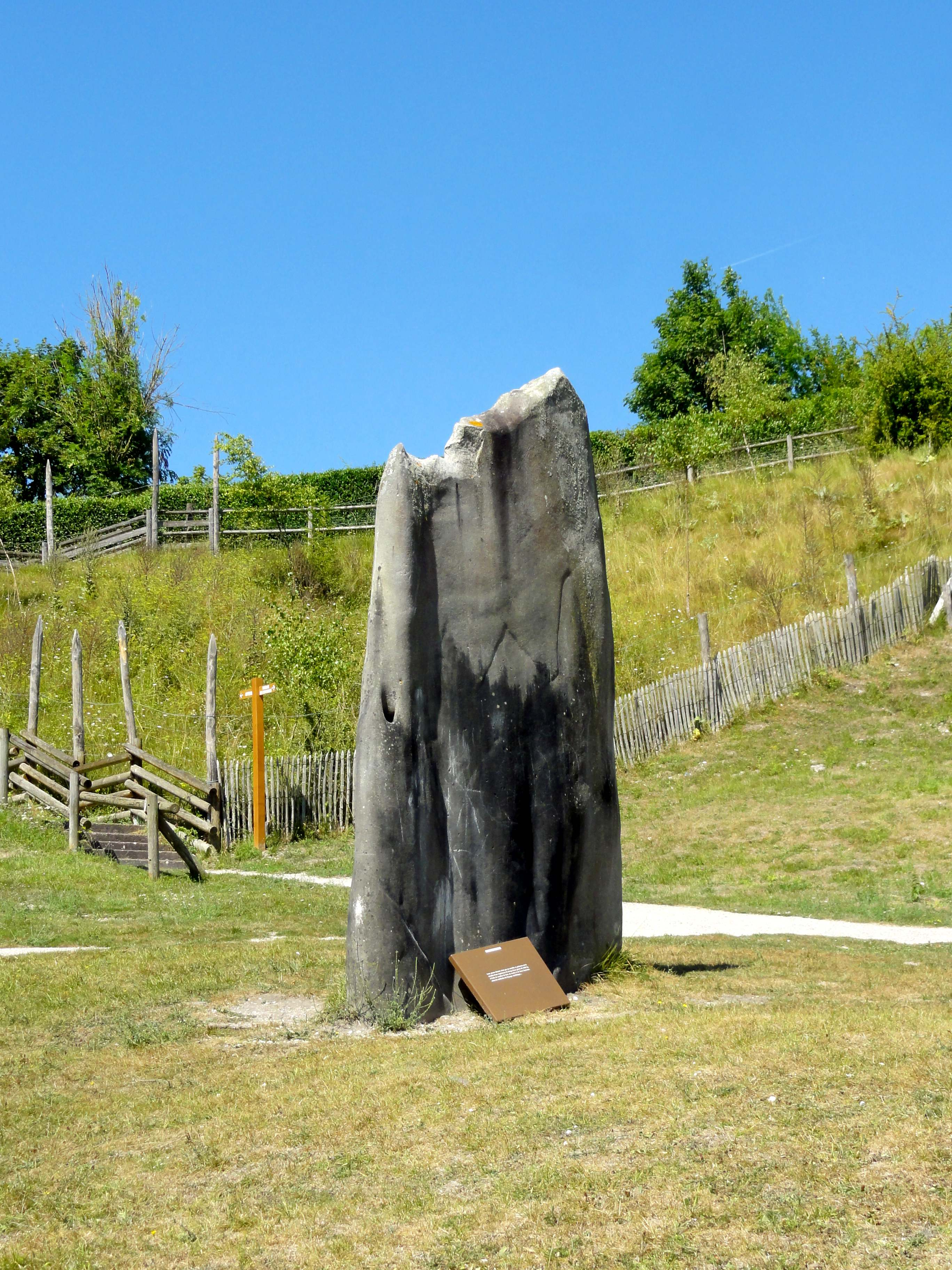 Parc de Samara - voir le titre du fichier.